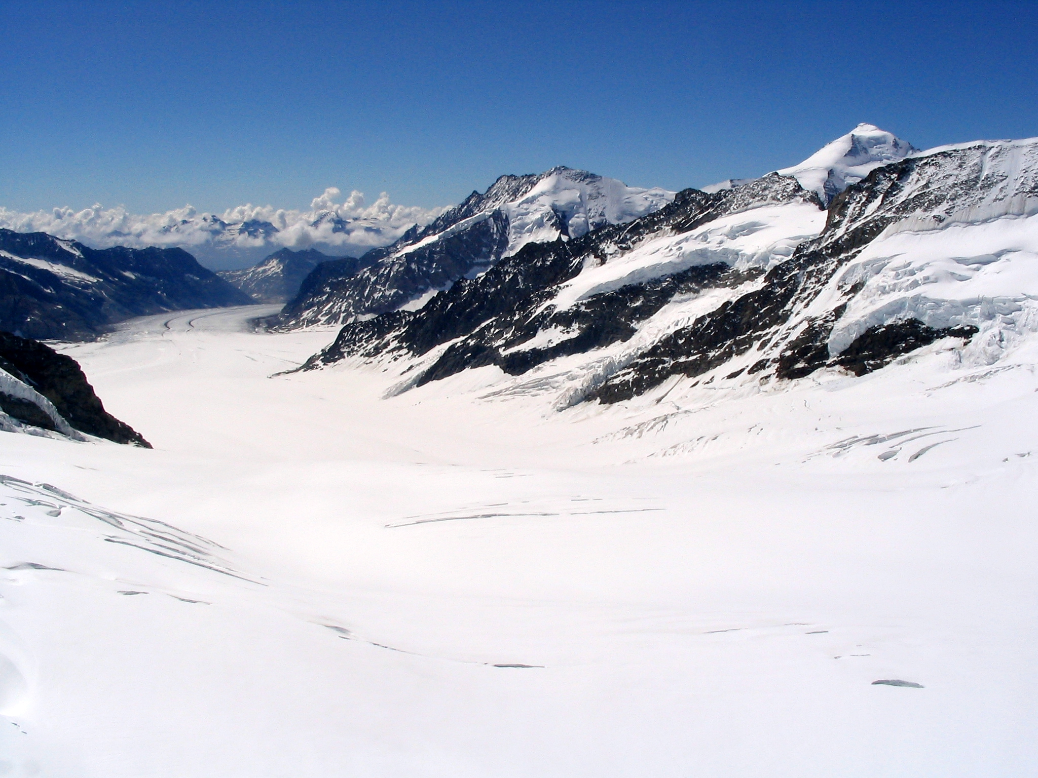 Grosser Aletschgletscher (Bernese Alps), view from Jungfraujoch, on the right Aletschhorn (4.195 m)